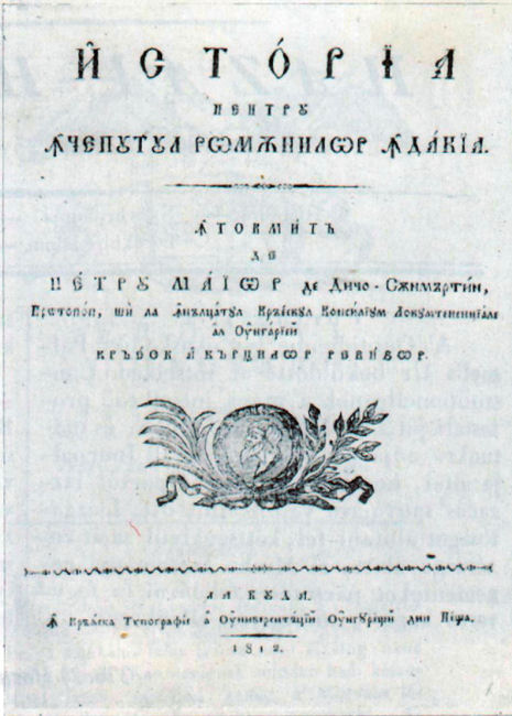 Petru Maior a románok történelmével foglalkozó könyvének címlapja